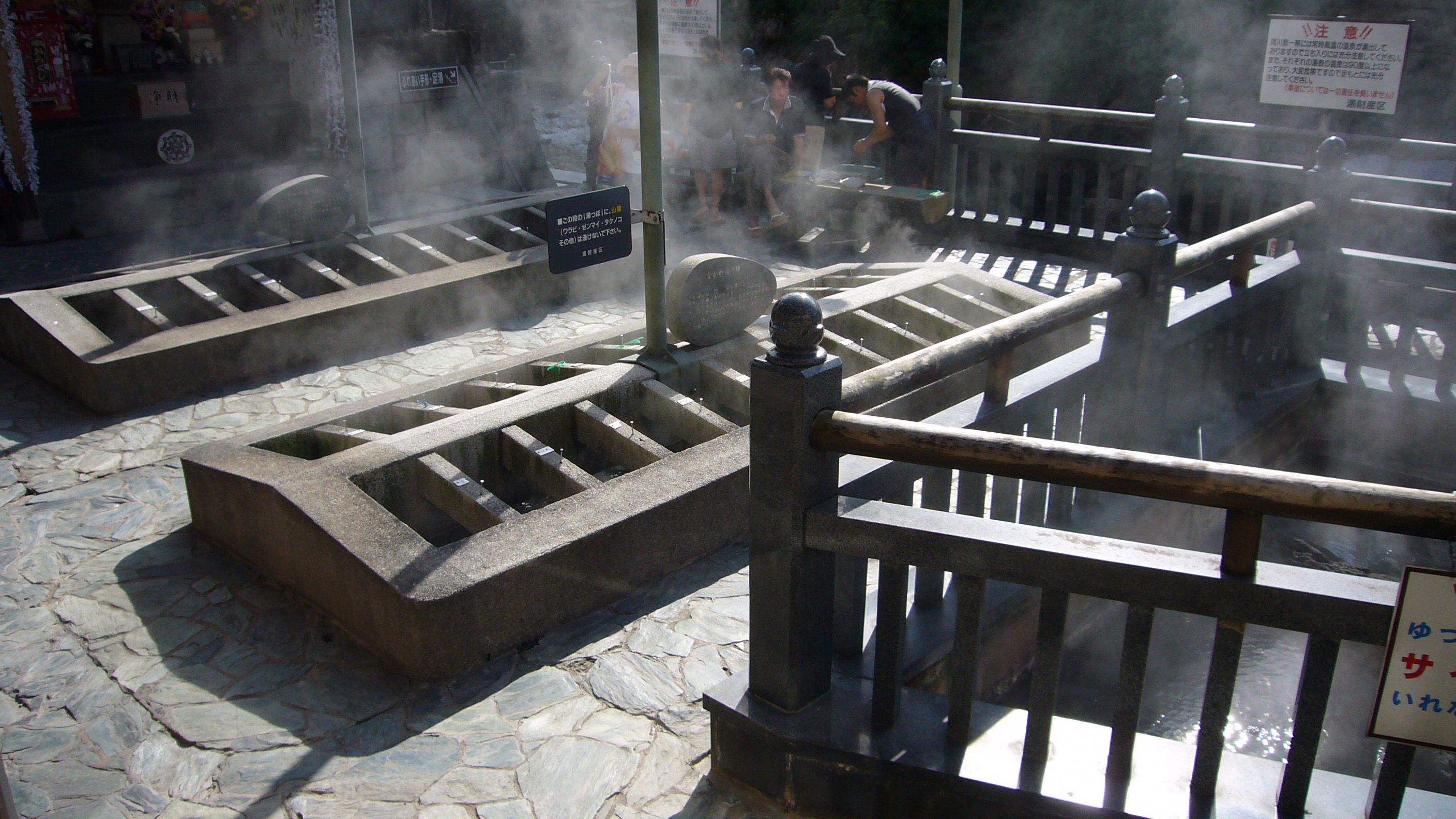 Yumura Onsen in Shinonsen, Hyogo, Japan